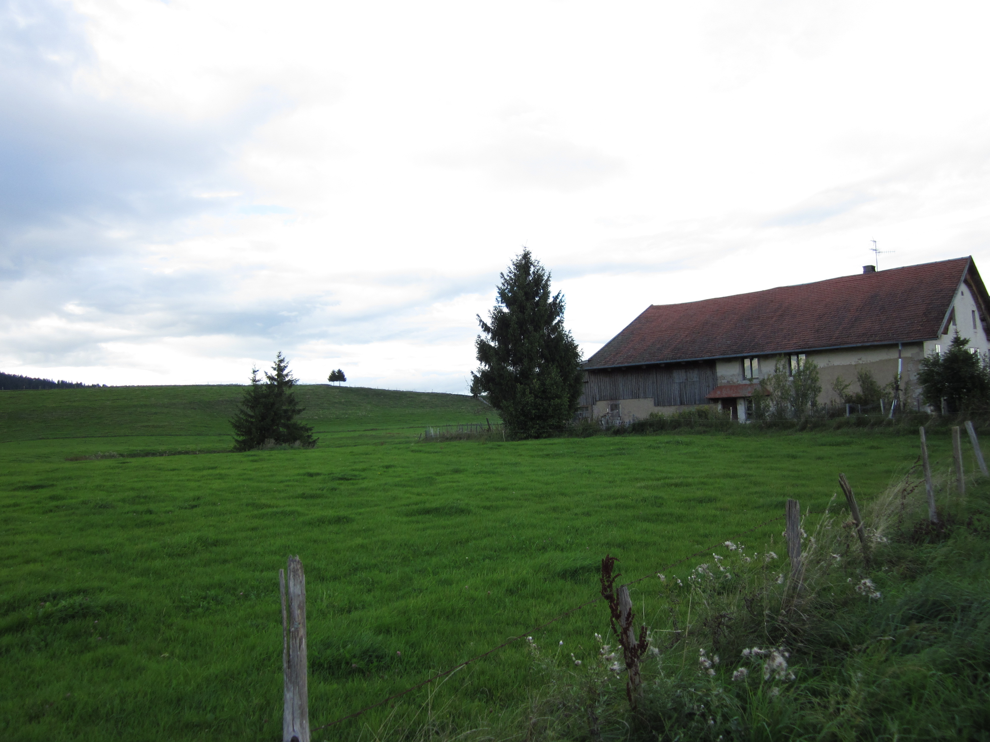 ferme et paysage Le Russey, département du Doubs